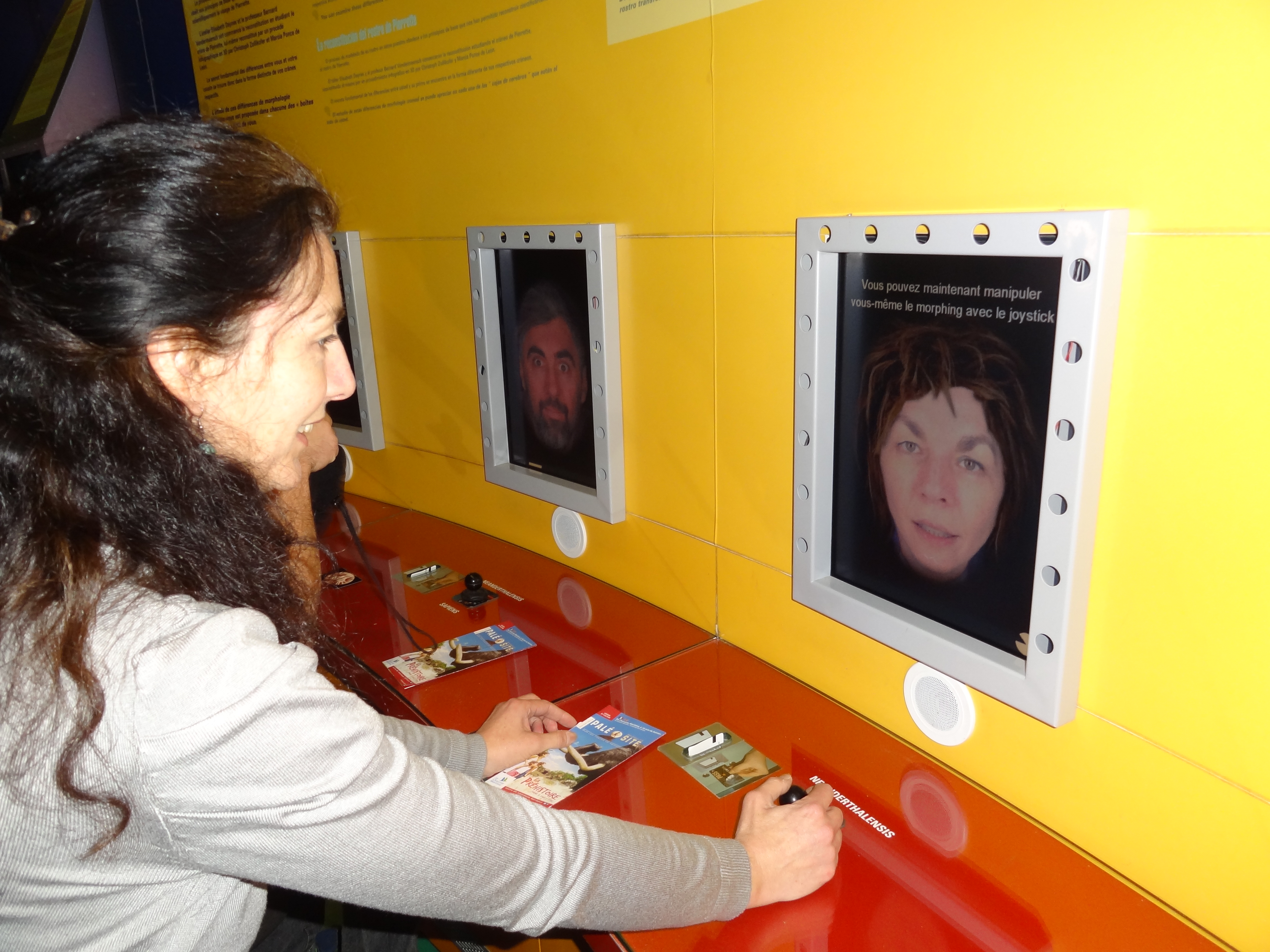 Atelier interactif Morphing dans la salle Morpho, Paléosite.